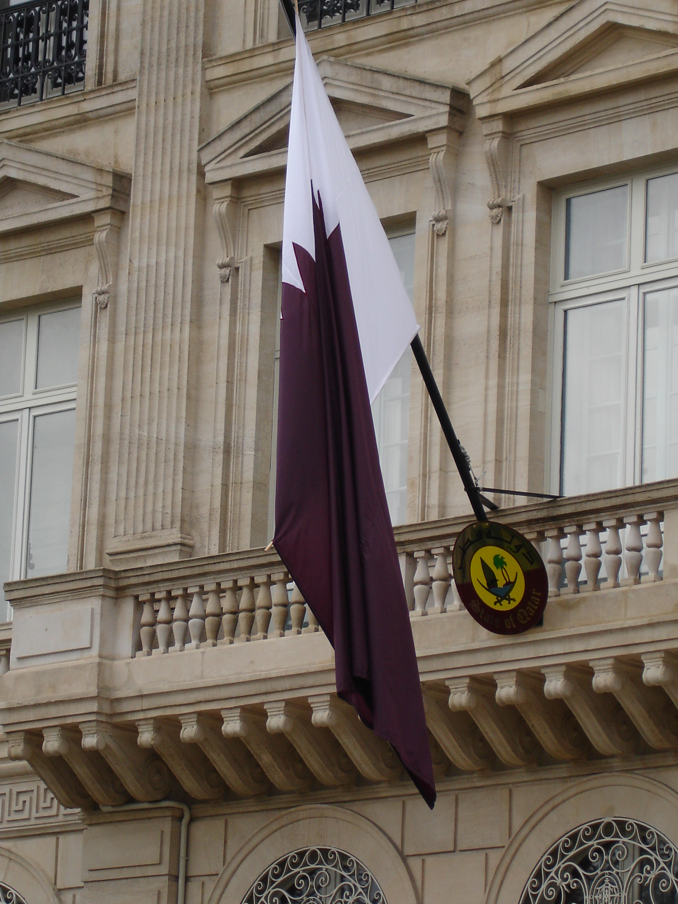 Qatar embassy in Paris